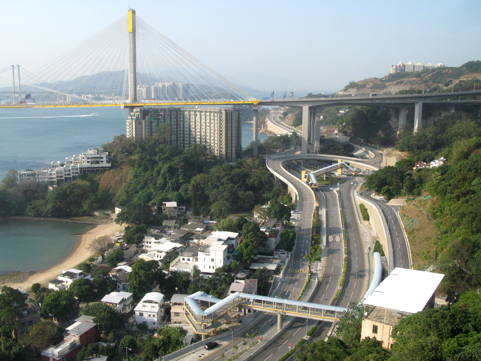 Ting Kau in 2008 2008年的汀九